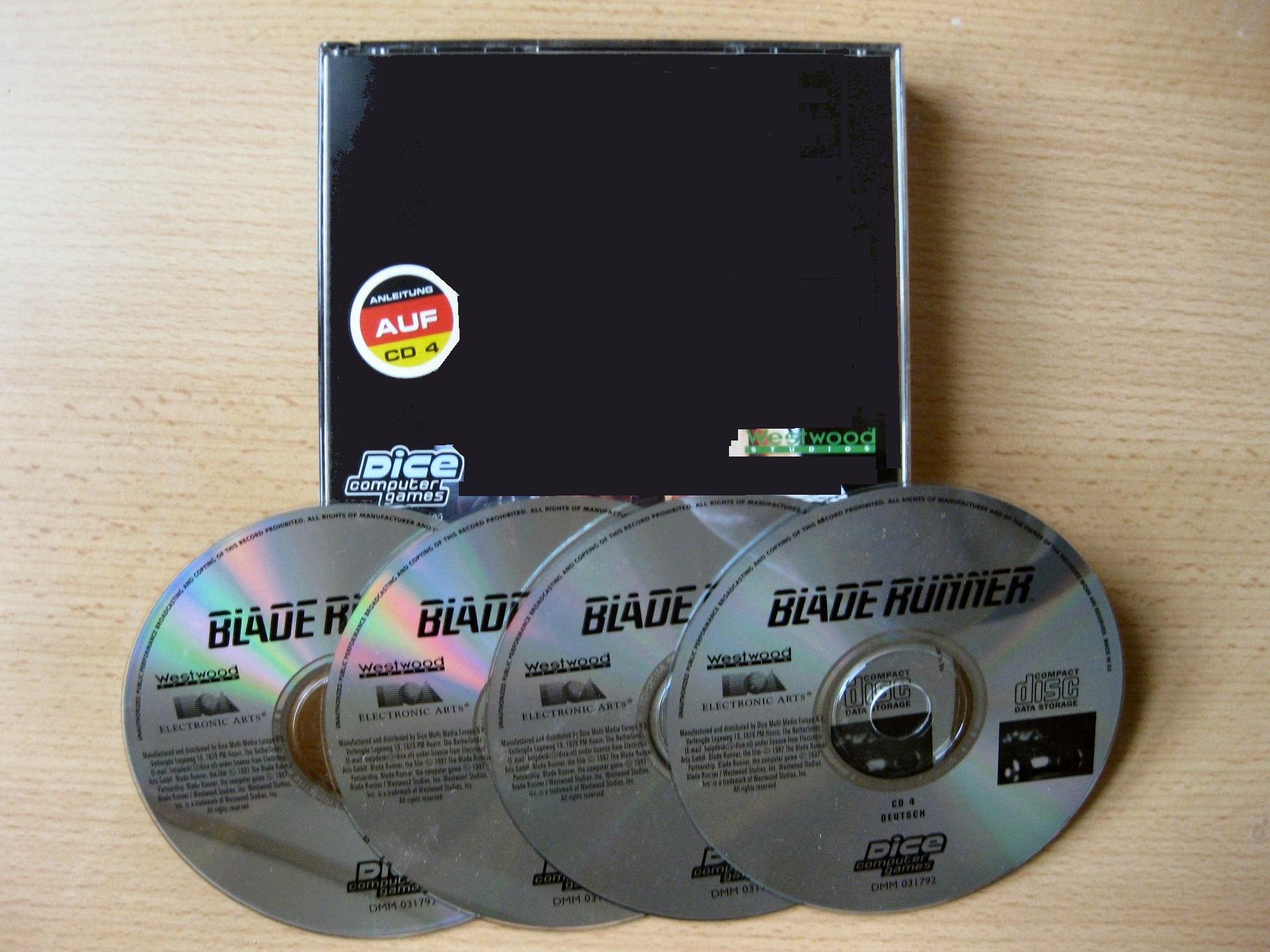 Blade Runner Computerspiel (ohne CD-Hüllen-Cover)